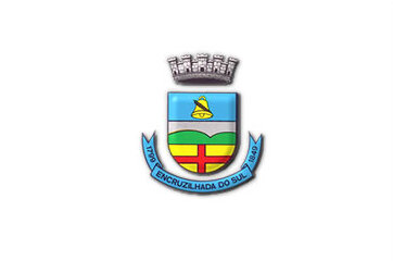 Bandeira da cidade de Encruzilhada do Sul Fonte